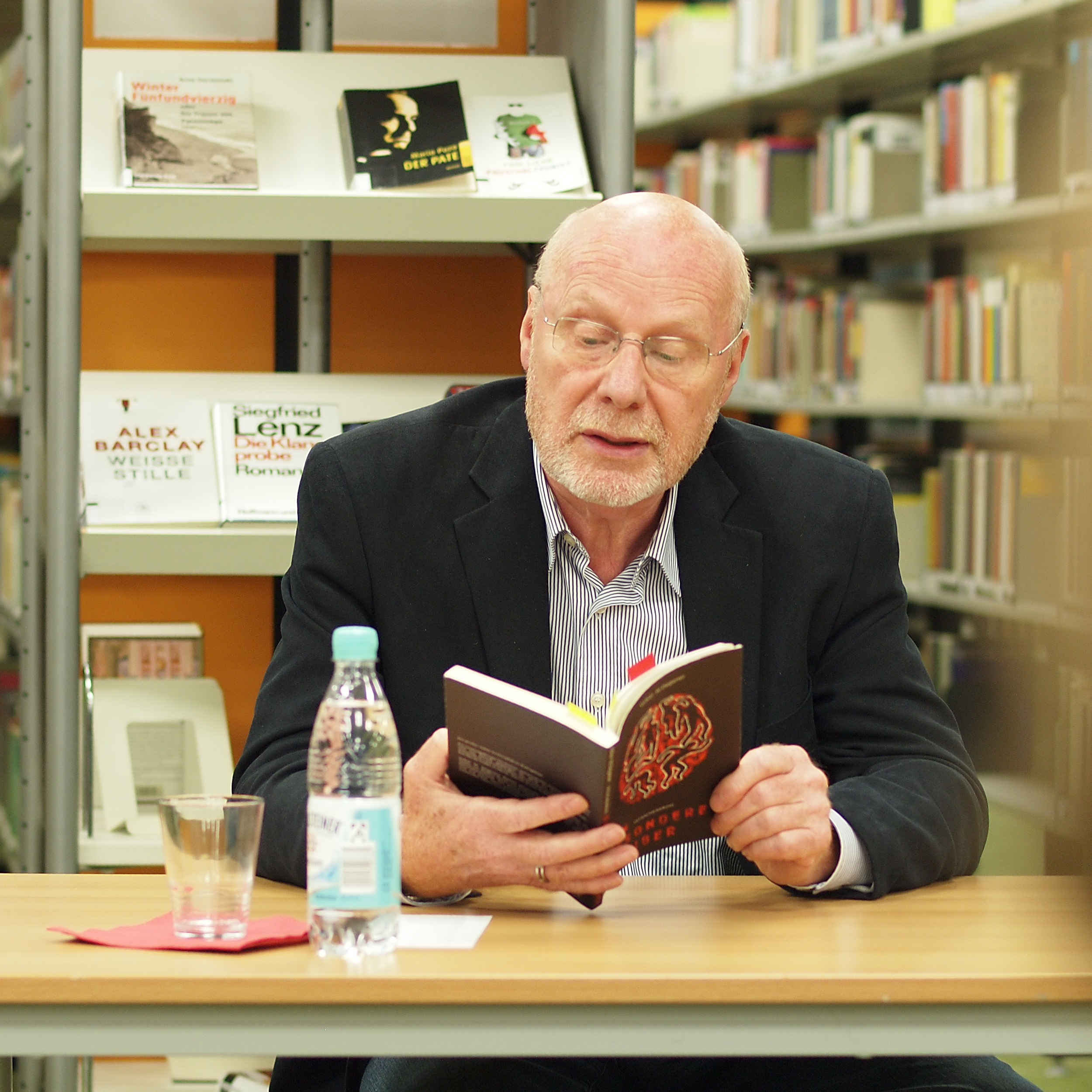 Der Schriftsteller Volker W. Degener bei einer Lesung aus seinem Buch Ein besonderes Kaliber in der Stadtbücherei Bochum